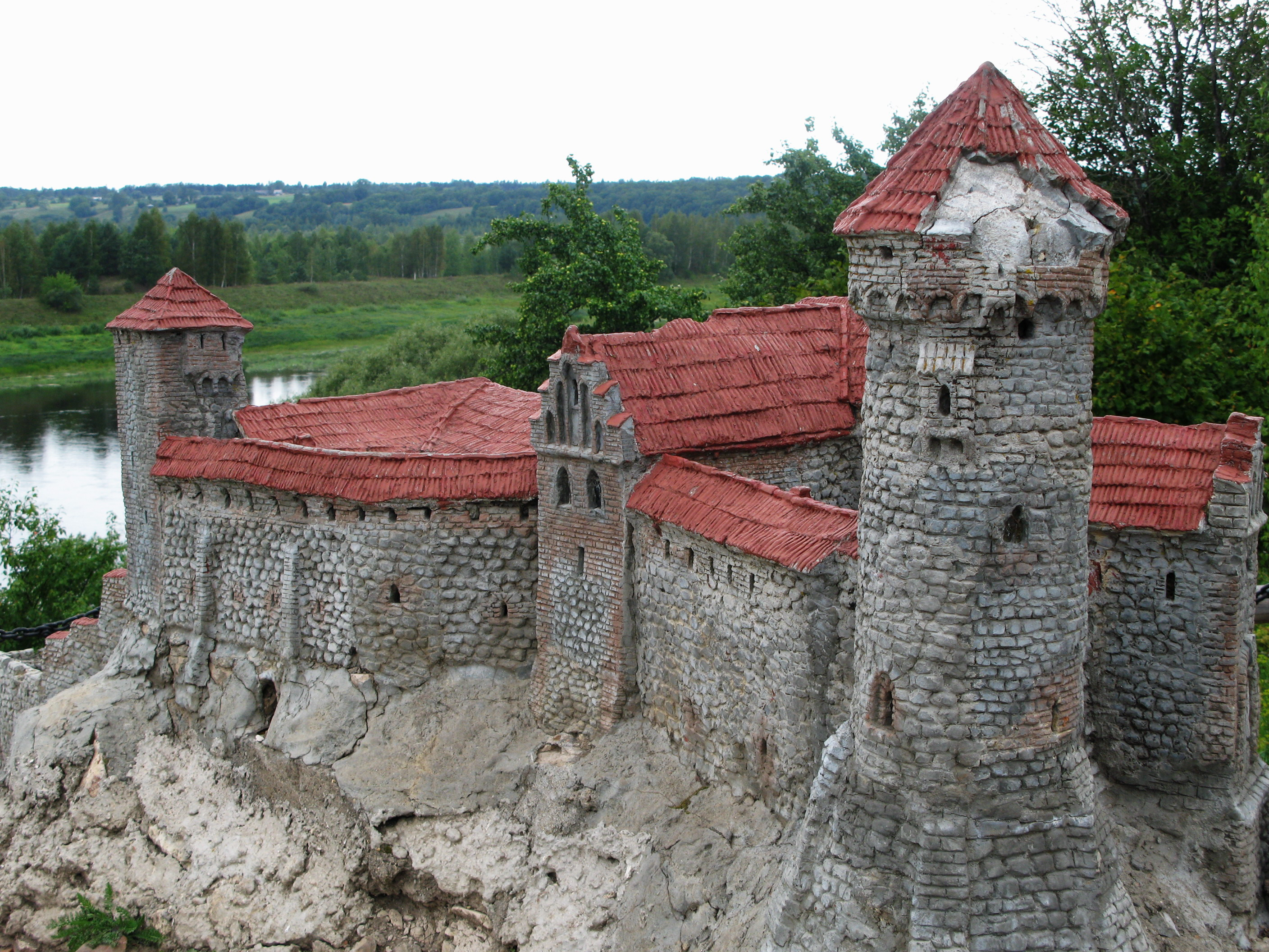 Dinaburgas pils